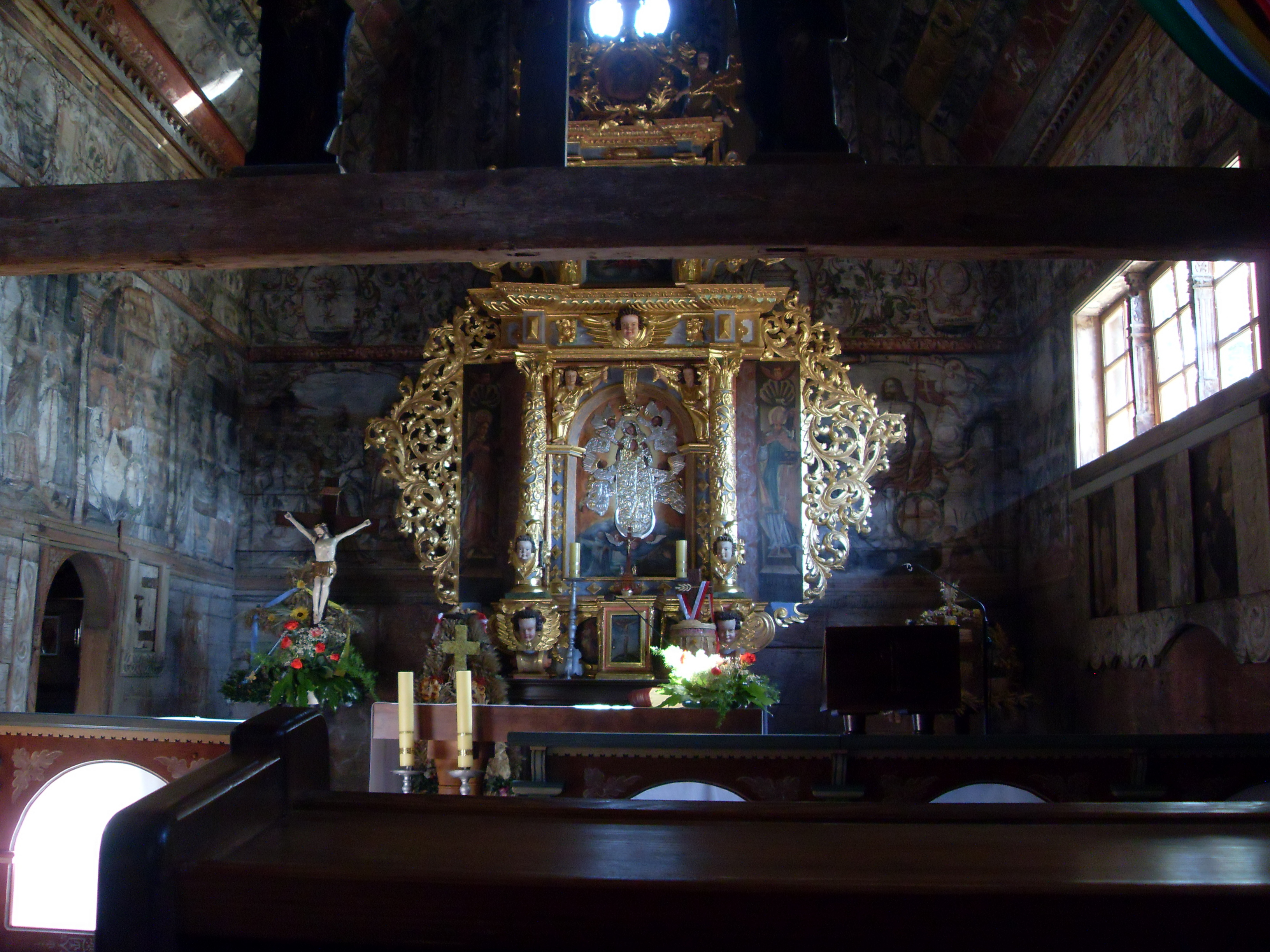 Kościół św. Mikołaja w Tarnowie Pałuckim